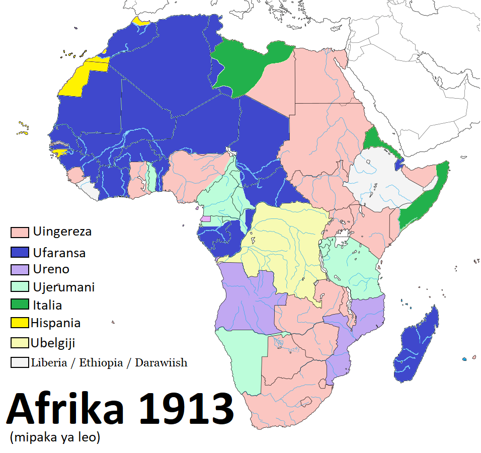 Kiswahili: Afrika jinsi ilivyogawiwa na wakoloni mnamo mwaka 1913 (kabla ya Vita Kuu I)